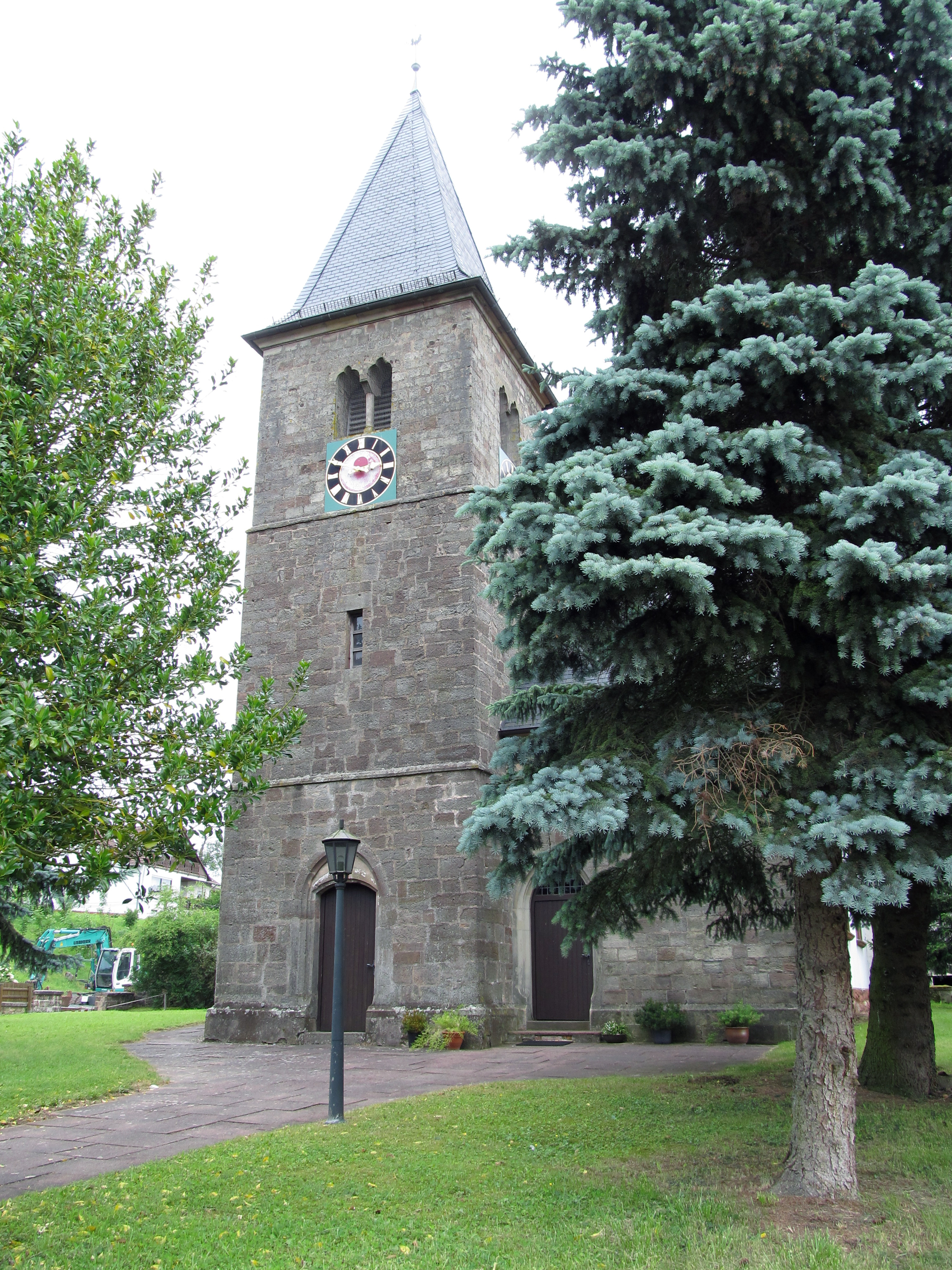 Die protestantische Kirche in Brenschelbach, Saarland